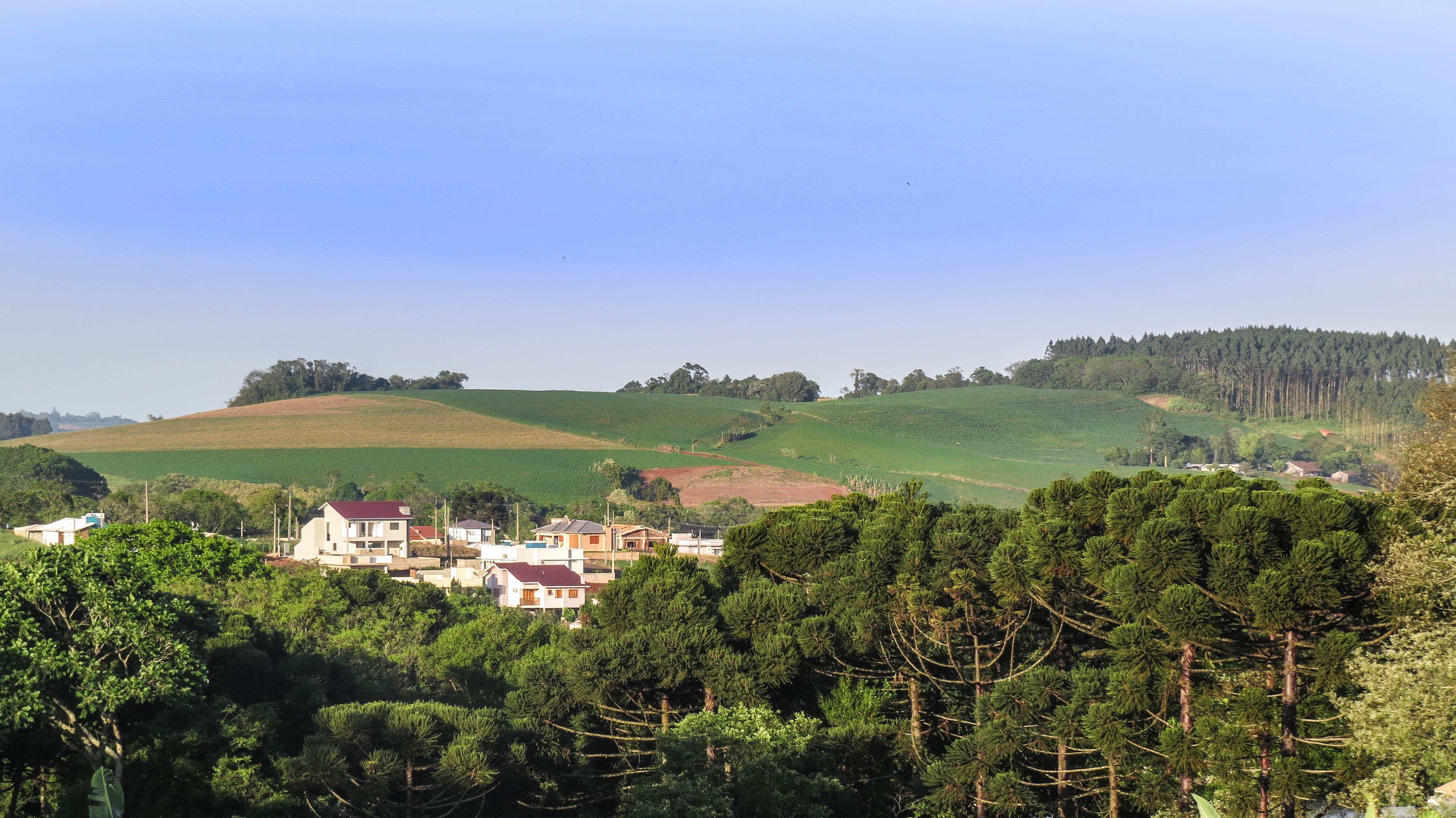 Vista parcial da área urbana de Iporã do Oeste